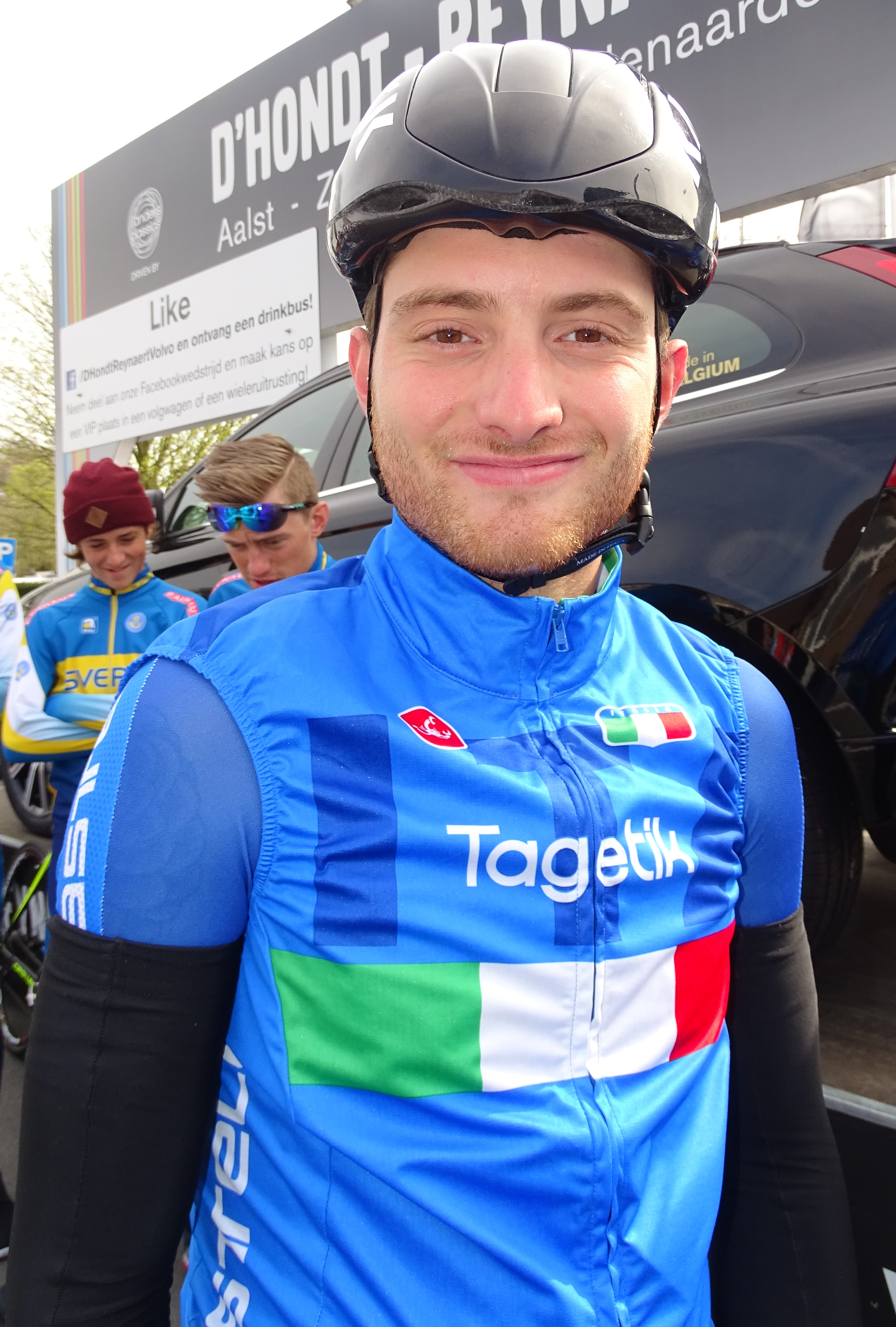 Reportage réalisé le samedi 9 avril à l'occasion du départ et de l'arrivée du Tour des Flandres espoirs 2016 à Audenarde, Belgique.